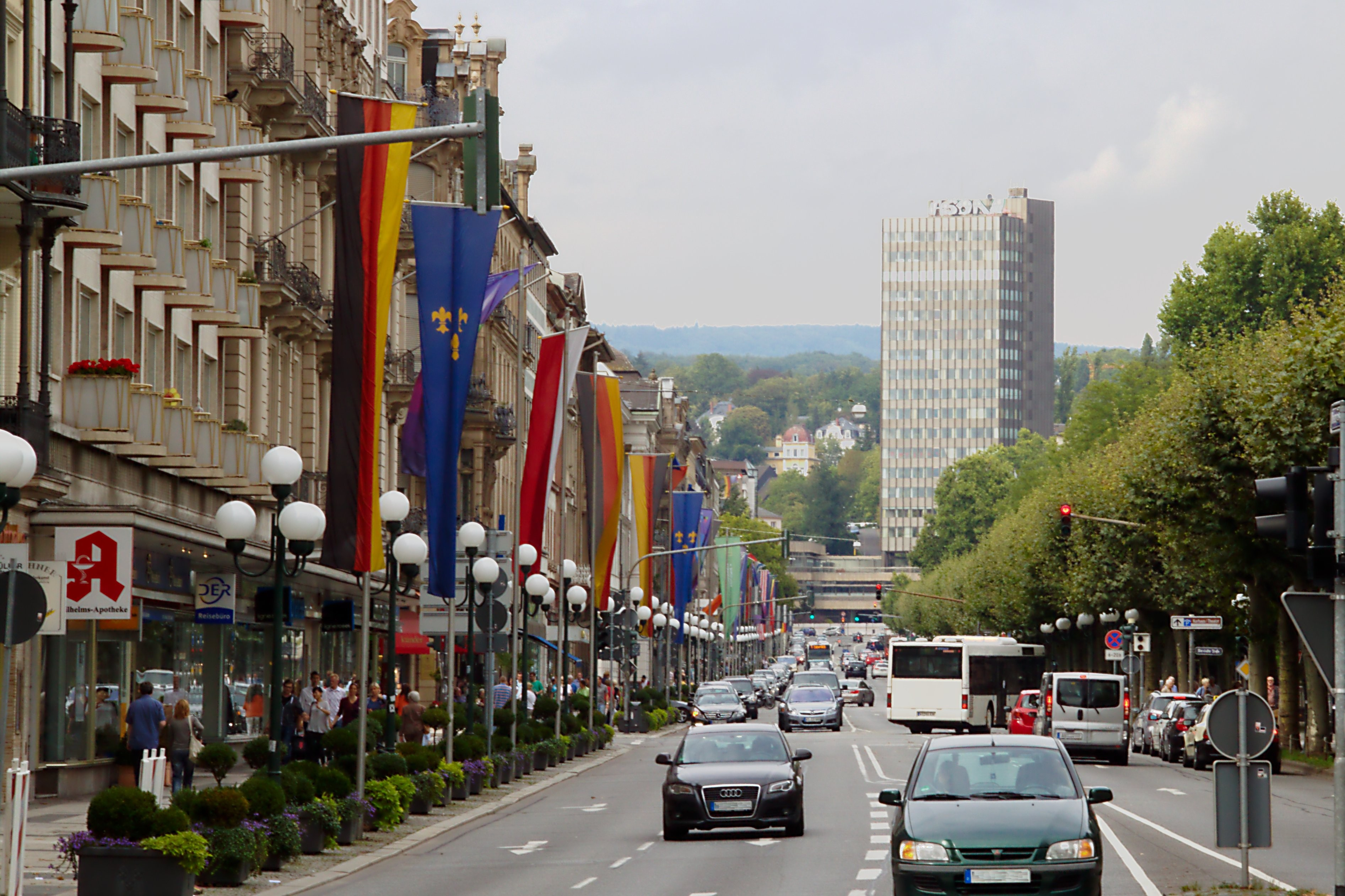 Wilhelmstraße in Wiesbaden, benannt nach Wilhelm Georg August Heinrich Belgus zu Nassau (1792-1839)